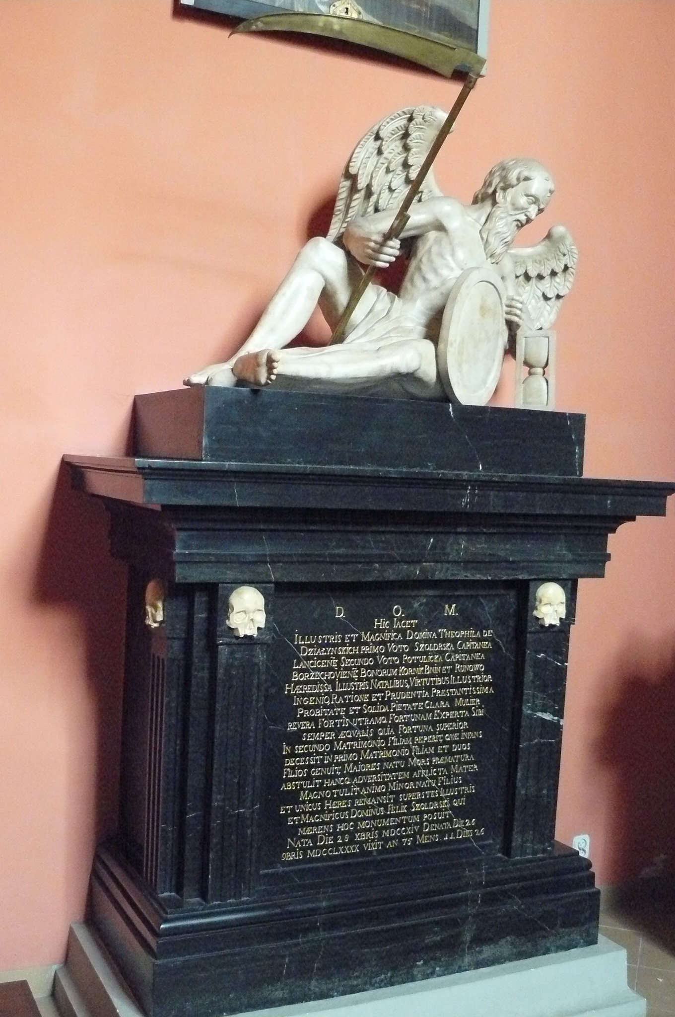 Nagrobek Białej Damy (Teofili Działyńskiej, Szołdrskiej-Potulickiej) w kościele kórnickim.